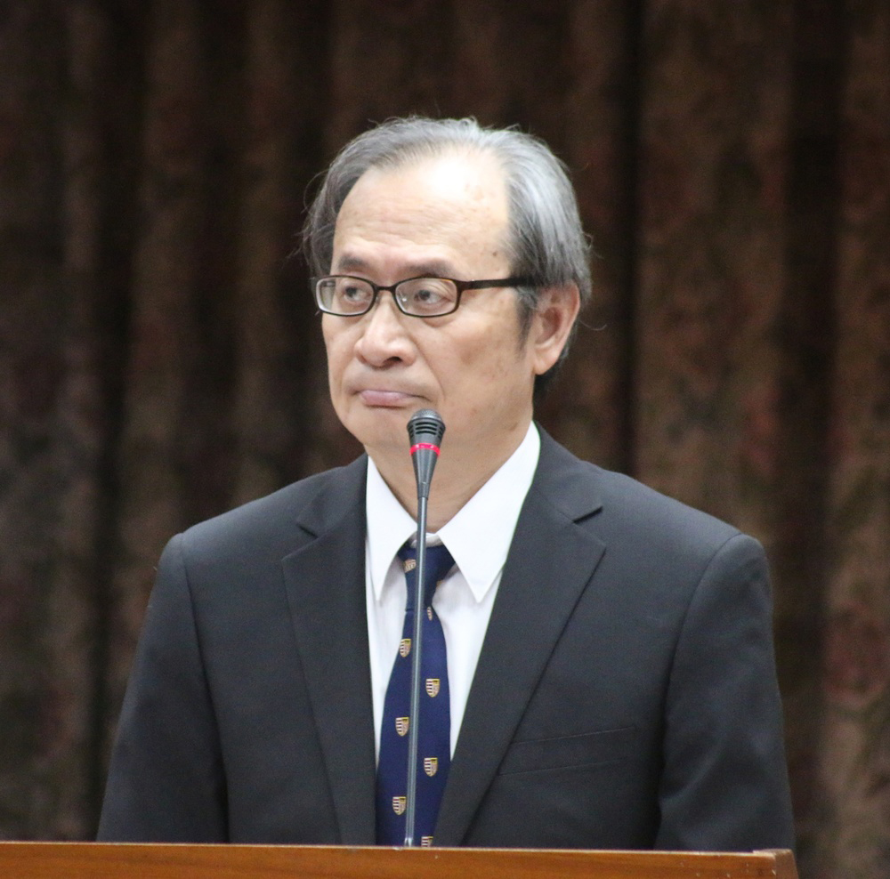 中文（台灣）: 原能會主委謝曉星答詢時強調，除非經濟部及台電提出重啟核一廠1號機的申請，原能會不會主動提出重啟1號機的專案報告。